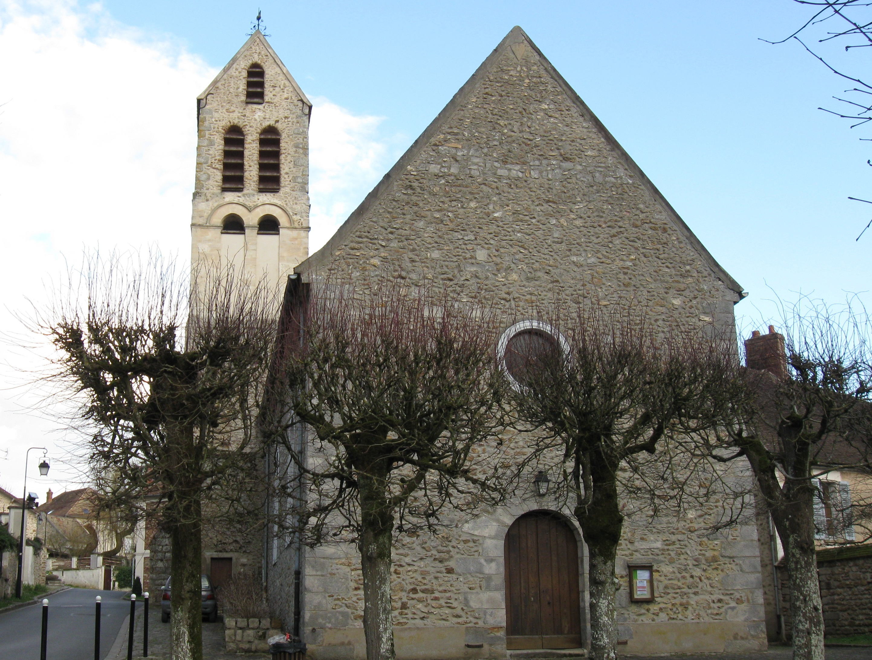 Église Saint-Sauveur de Saint-Sauveur-sur-École. (Seine-et-Marne, région Île-de-France).